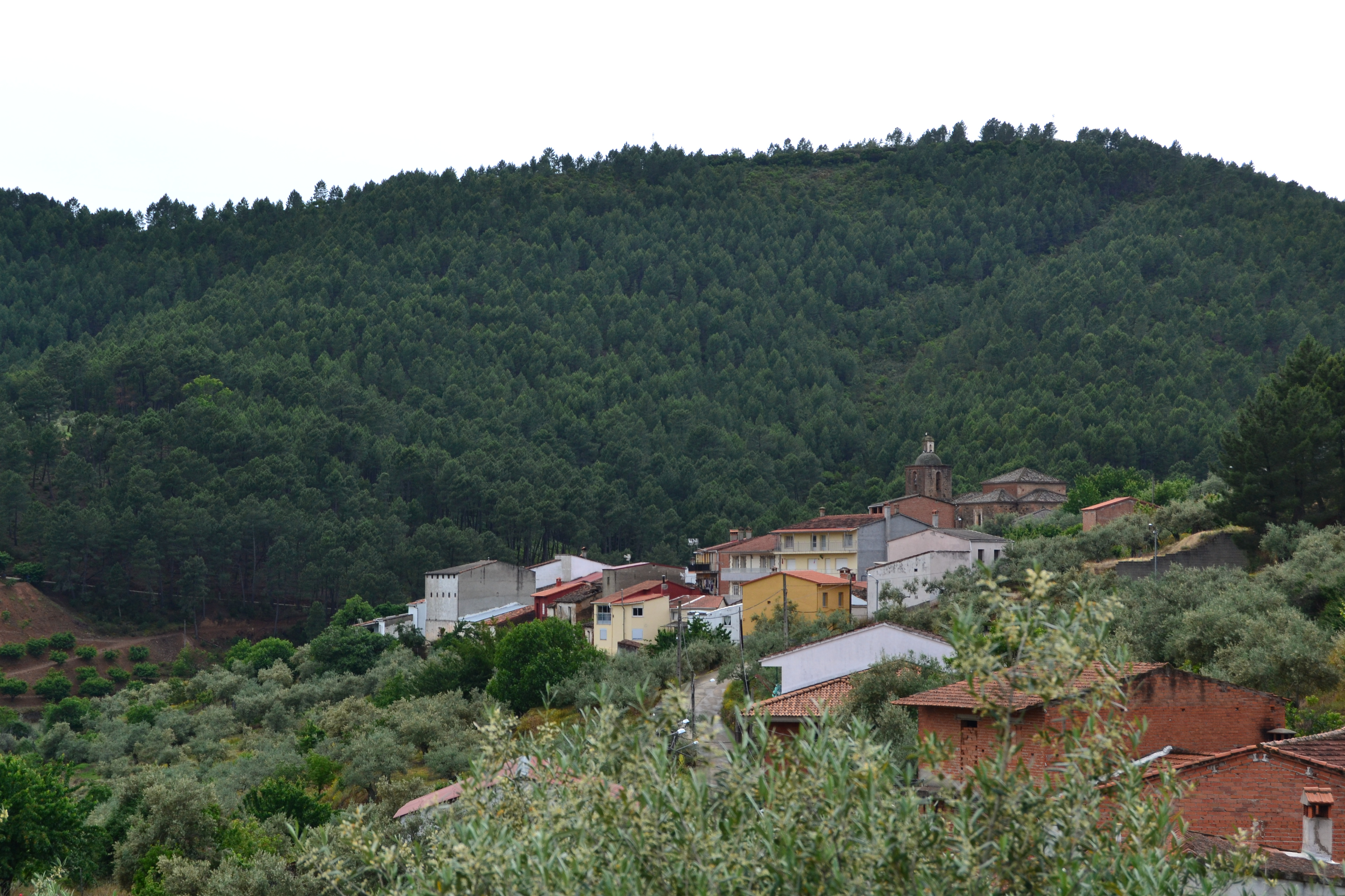 Vista general de Cambroncino, desde el Barrio de Abajo. Sobresaliendo sobre los tejados, puede observarse la torre de la Iglesia de Santa Catalina.